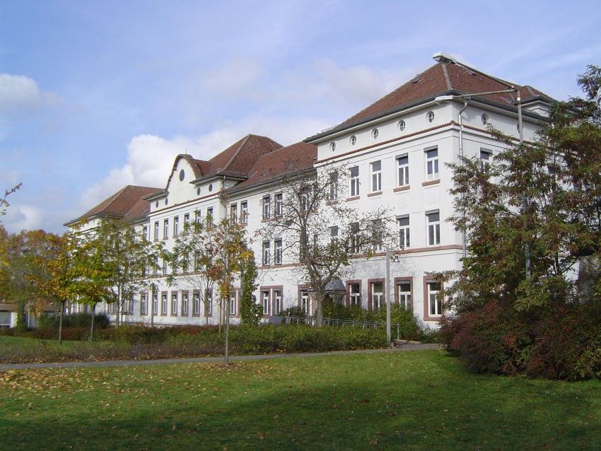 Fachhochschule Aschaffenburg Gebäude 20